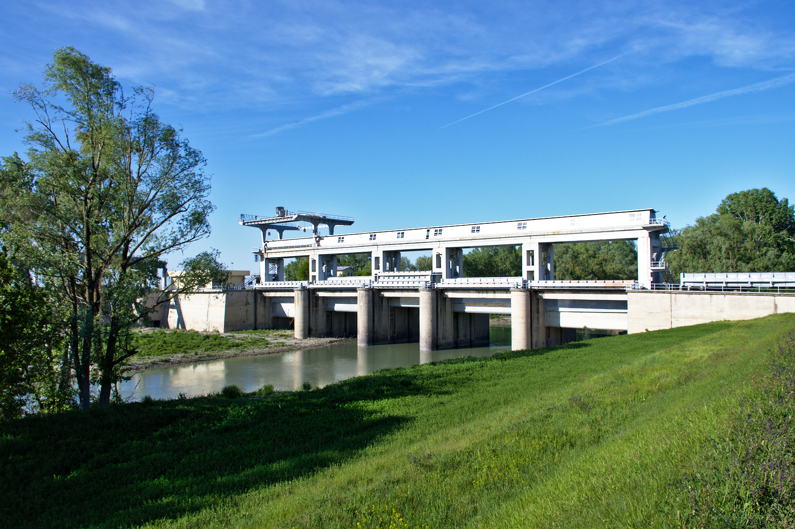 Fiume Po da Stellata a Mesola e Cavo Napoleonico (Q55443083)